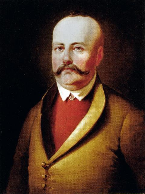 Беларуская (тарашкевіца): Партрэт Тадэвуша Рэйтана (Tadevuš Rejtan)